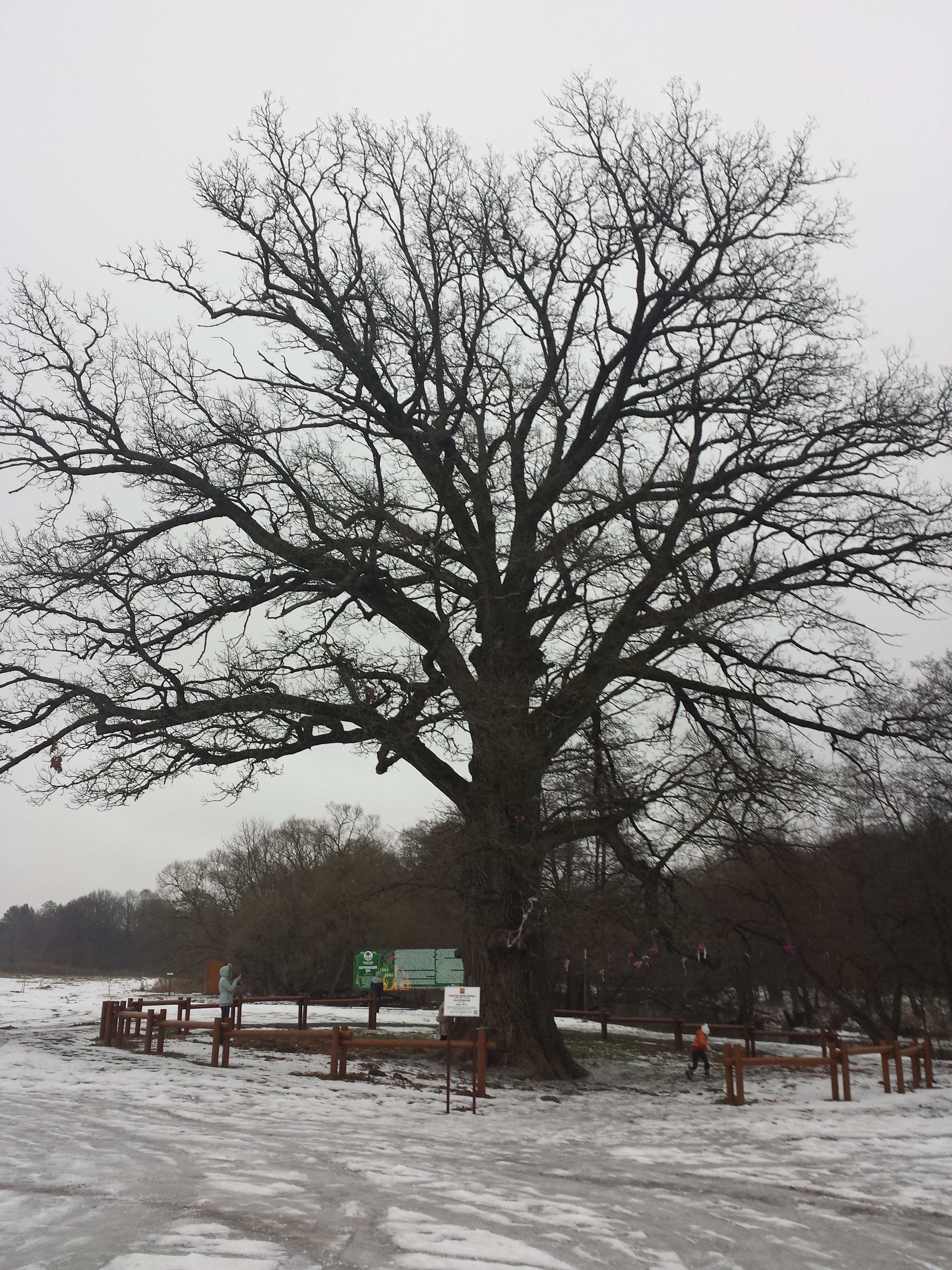 Партизанский дуб, Навлинский район This image is related to the protected area of Russia number 3210178